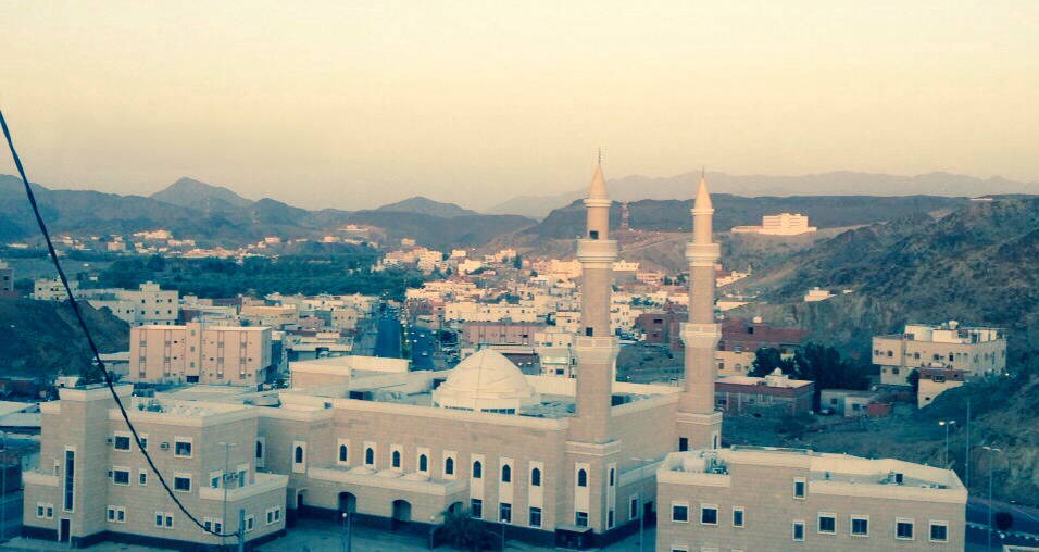 صوره لمحافظة الكامل